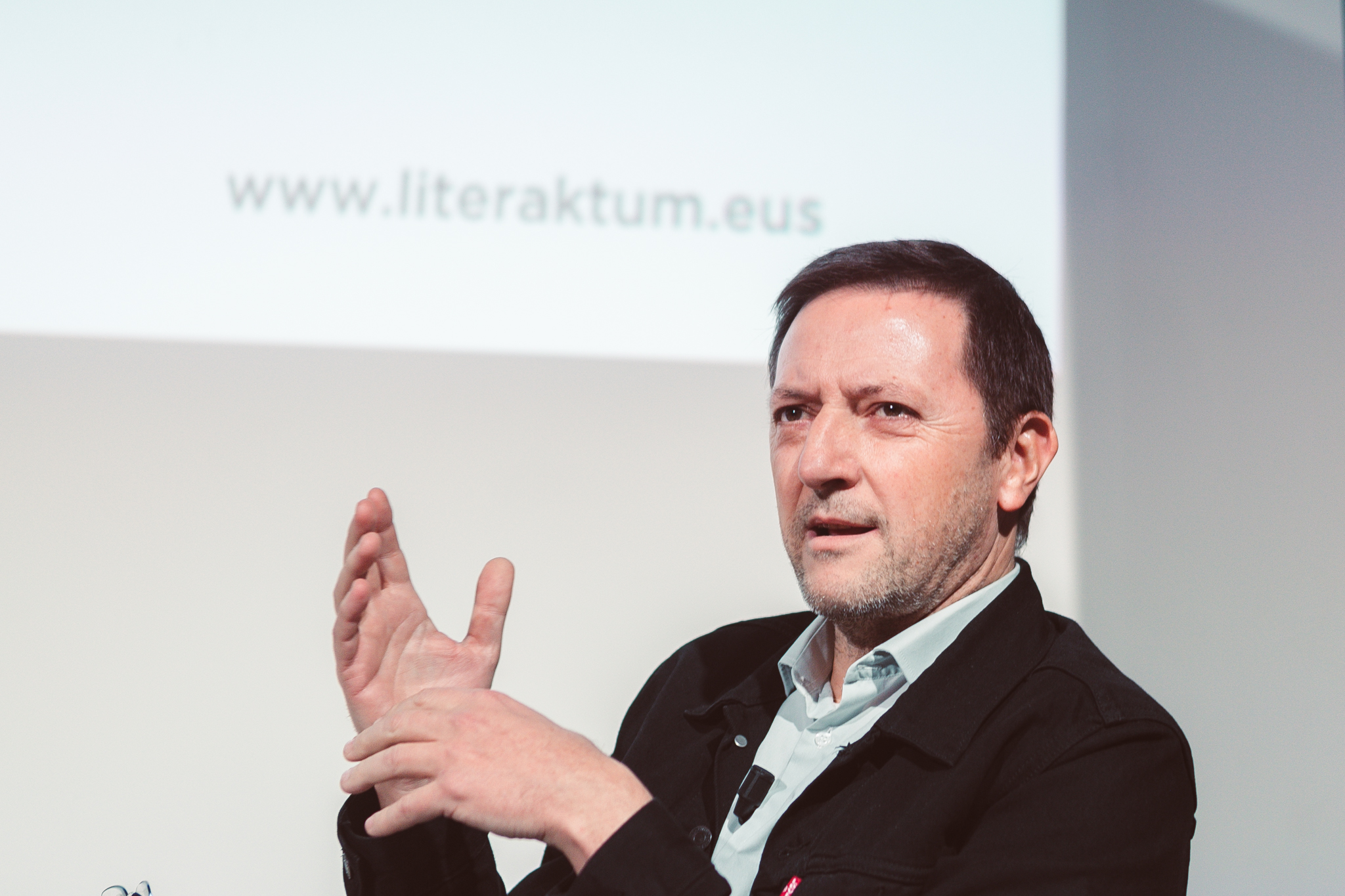 Ignacio Martínez de Pisón & Bernardo Atxaga Literaktum 17 Tabakalera Argazkilaria/fotógrafa: Lorena Otero